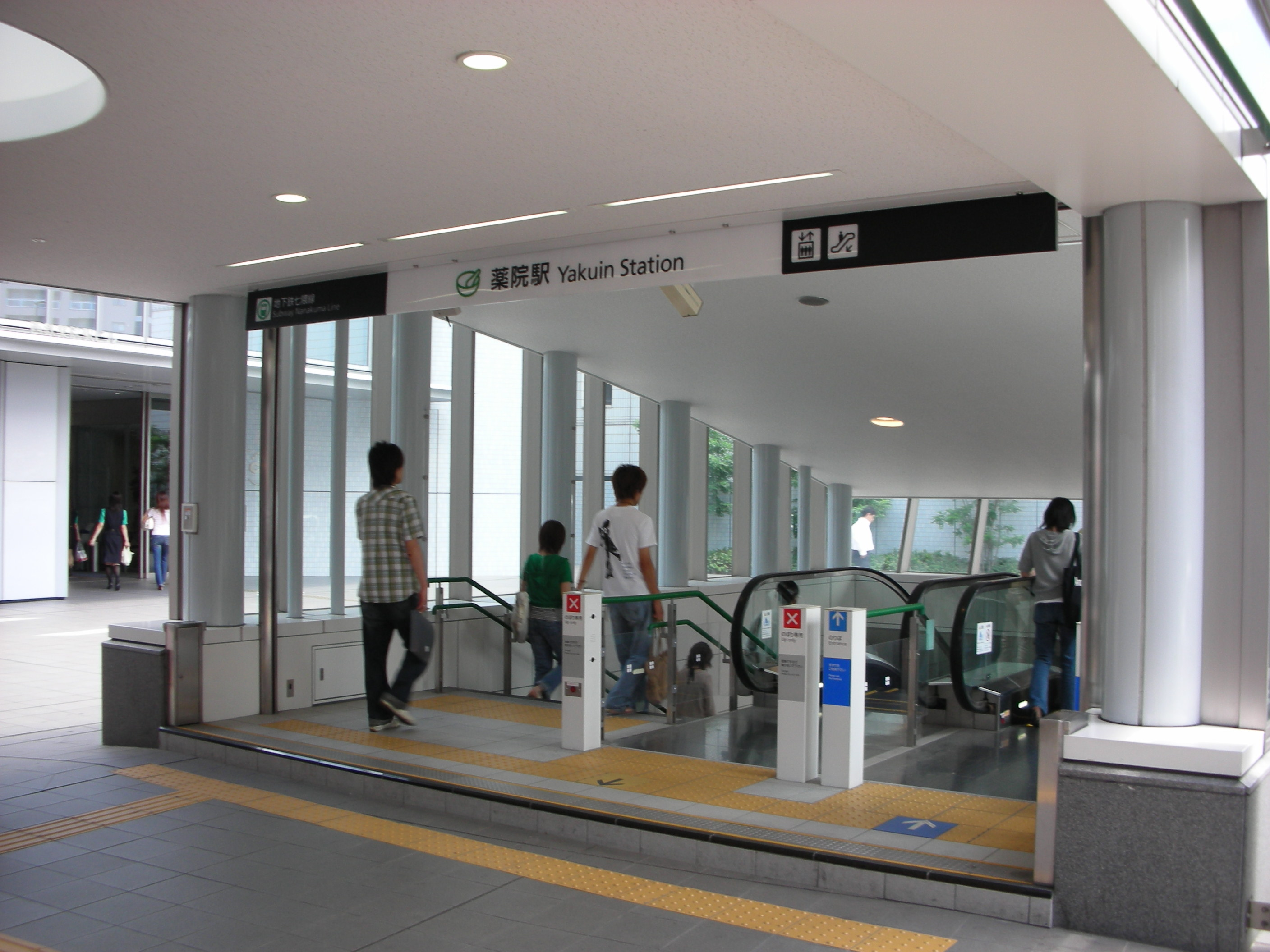 福岡市地下鉄薬院駅